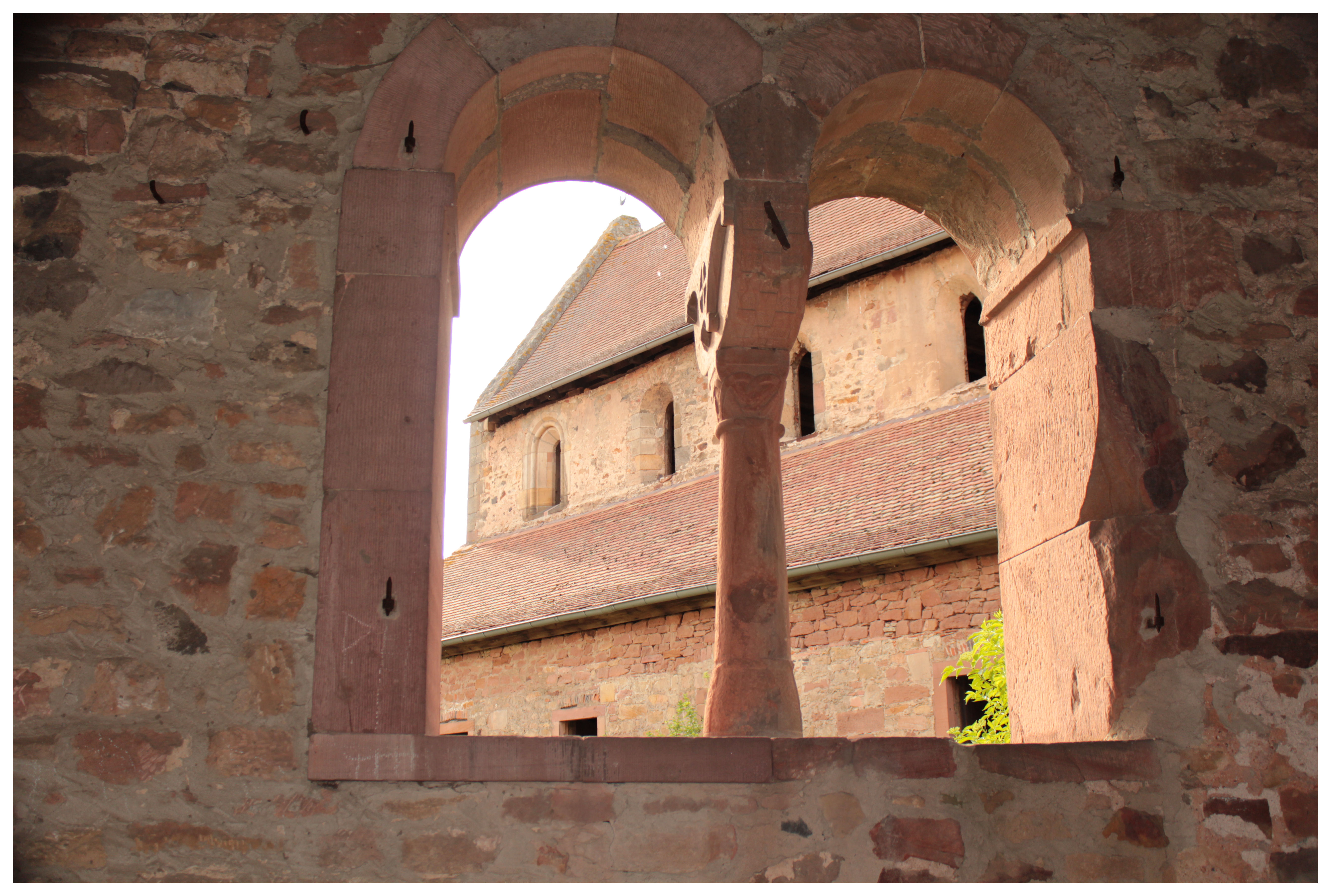 Kloster Konradsdorf Fenster